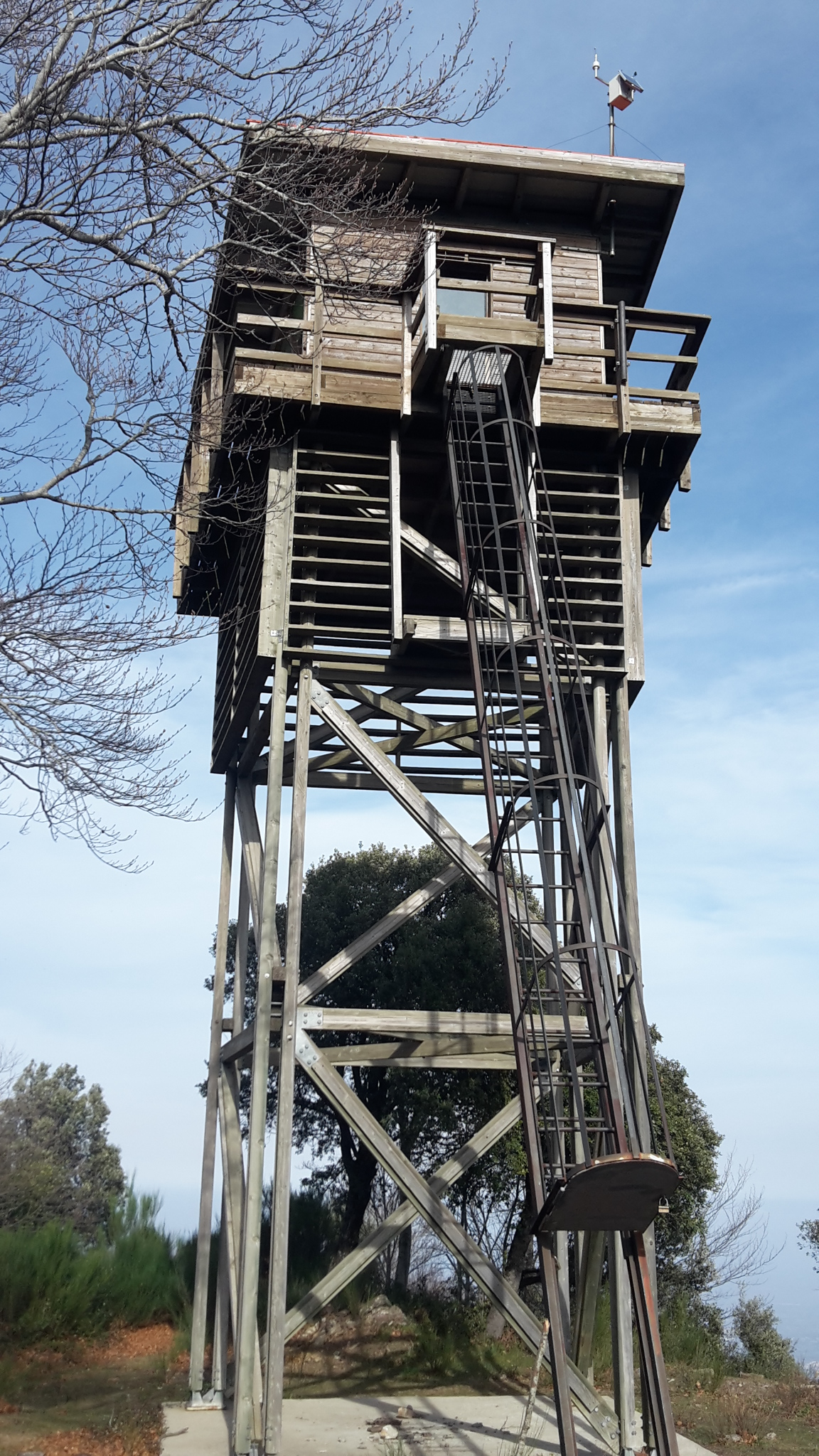 Tour de guet du Pic del Bolaric